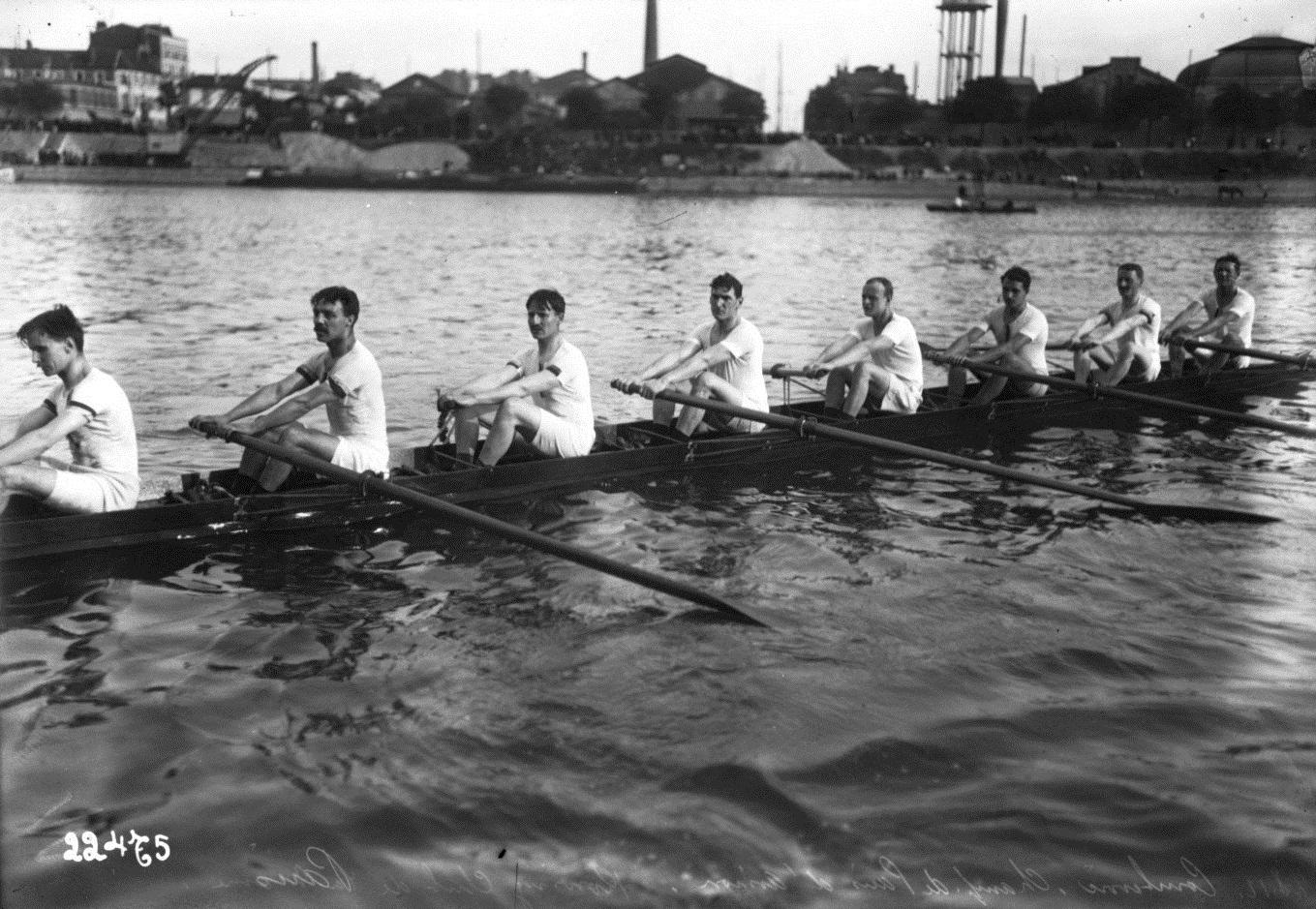 4-8-12, championnats de Paris d'aviron, équipe du Rowing club de Paris [huit rameurs, dans le bassin de Courbevoie-Asnières] : [photographie de presse] / [Agence Rol]